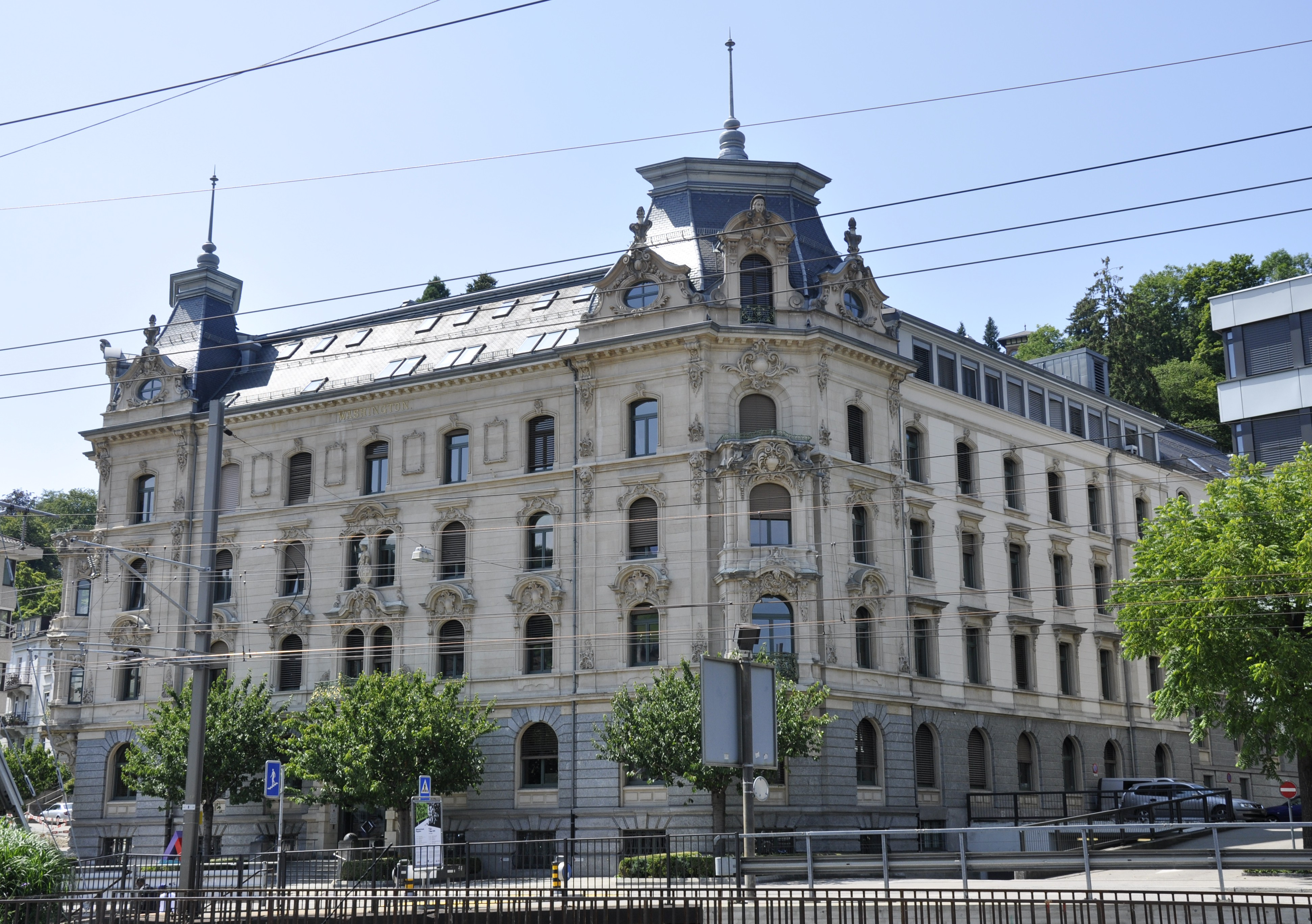 Geschäftshaus Washington